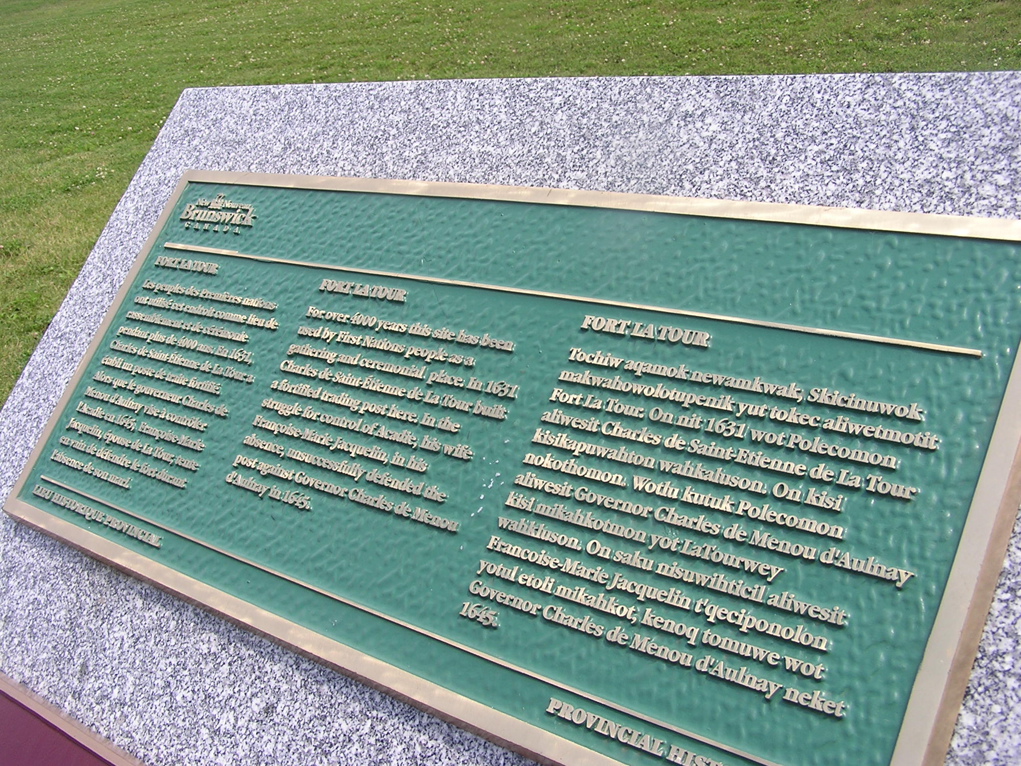 Fort La Tour